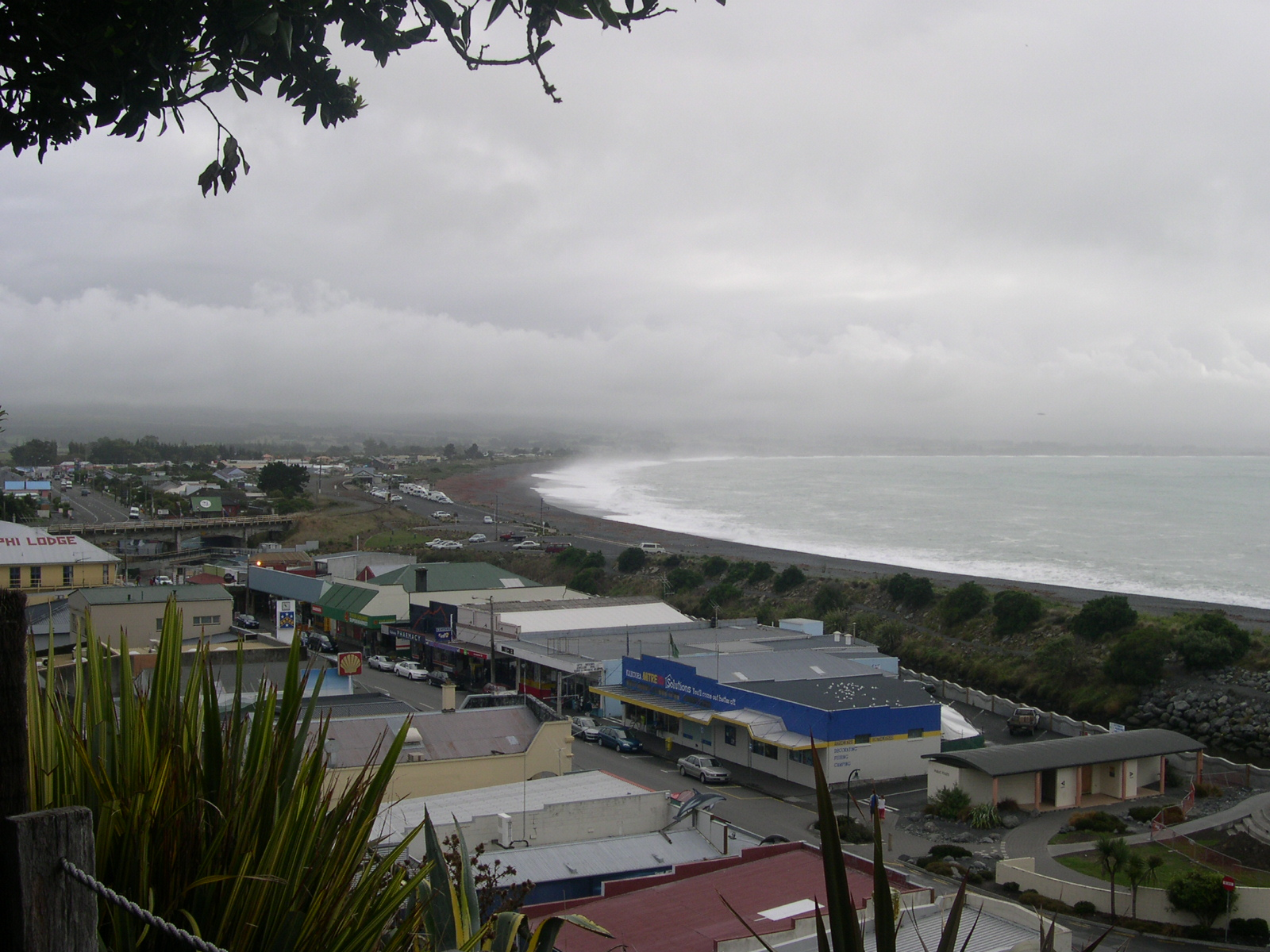 Kaikoura downtown